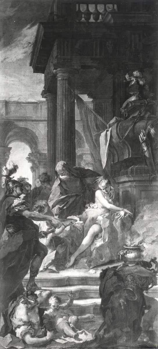 Giambattista Pittoni, Sacrificio di Polissena, 1720 circa, già palazzo Tecchio Caldogno, Vicenza; distrutto neli bombardamento del gennaio 1945